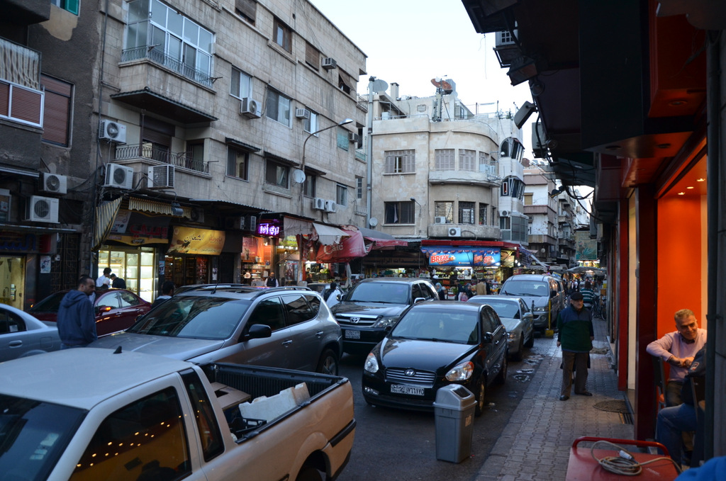 منطقة المهاجرين حي الحبوبي سوق الشعلان